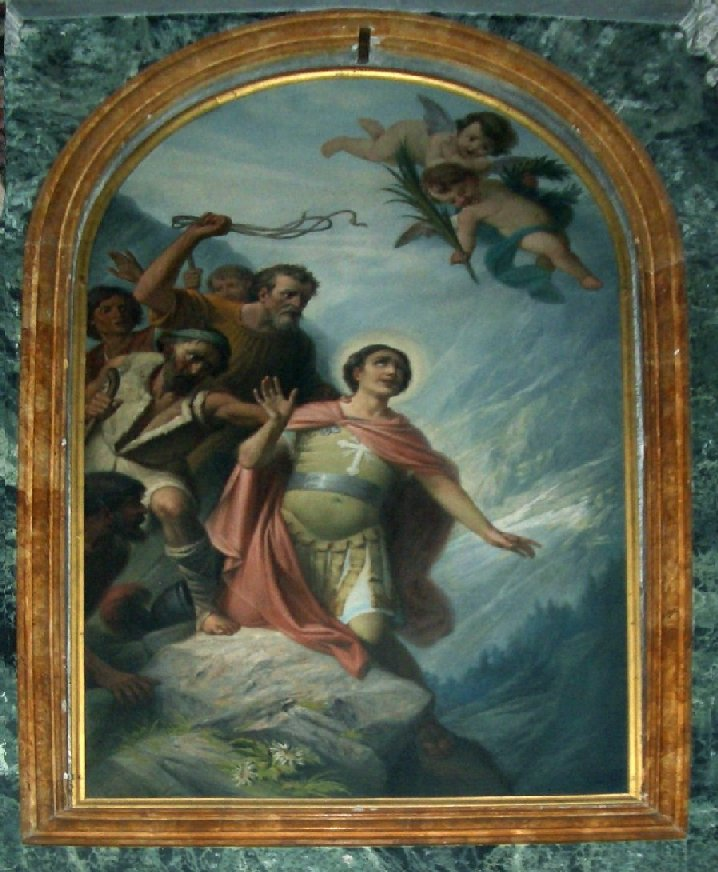 foto da me realizzata